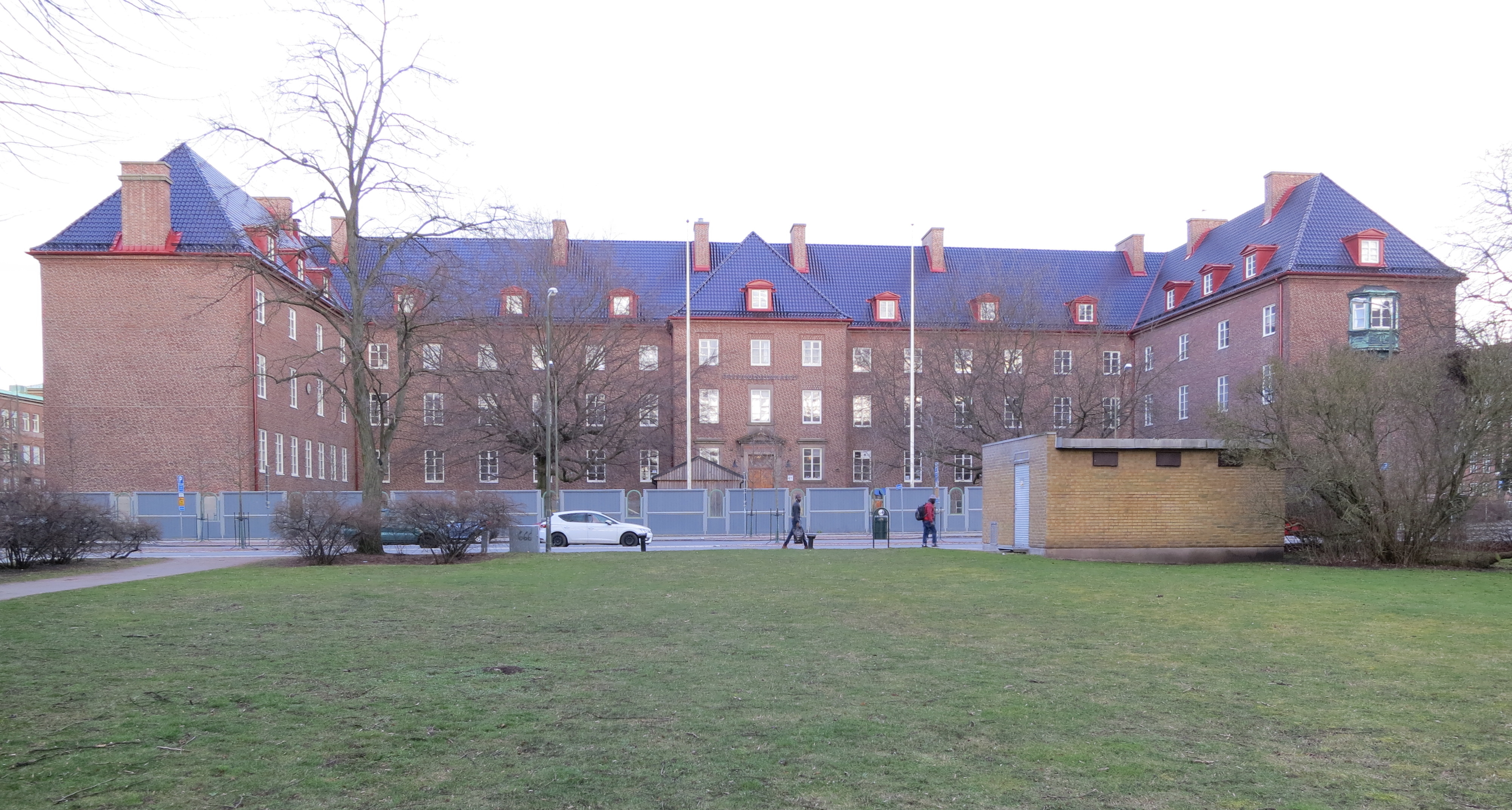 Pildammsskolan, mars 2016